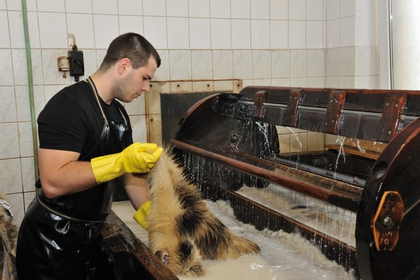 Reinigen von Wildschweinschwarten in der Haspel. Udo Meinelt & Söhne, Rötha